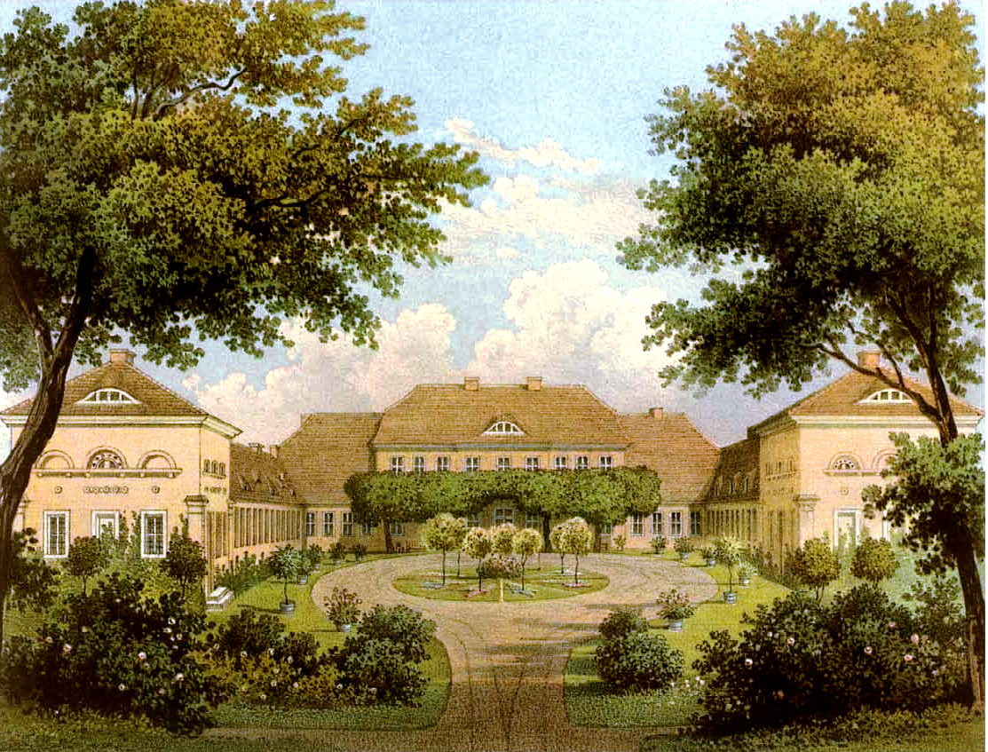 Gut Blumberg, Kreis Randow, Provinz Pommern, Lithographie von Alexander Duncker